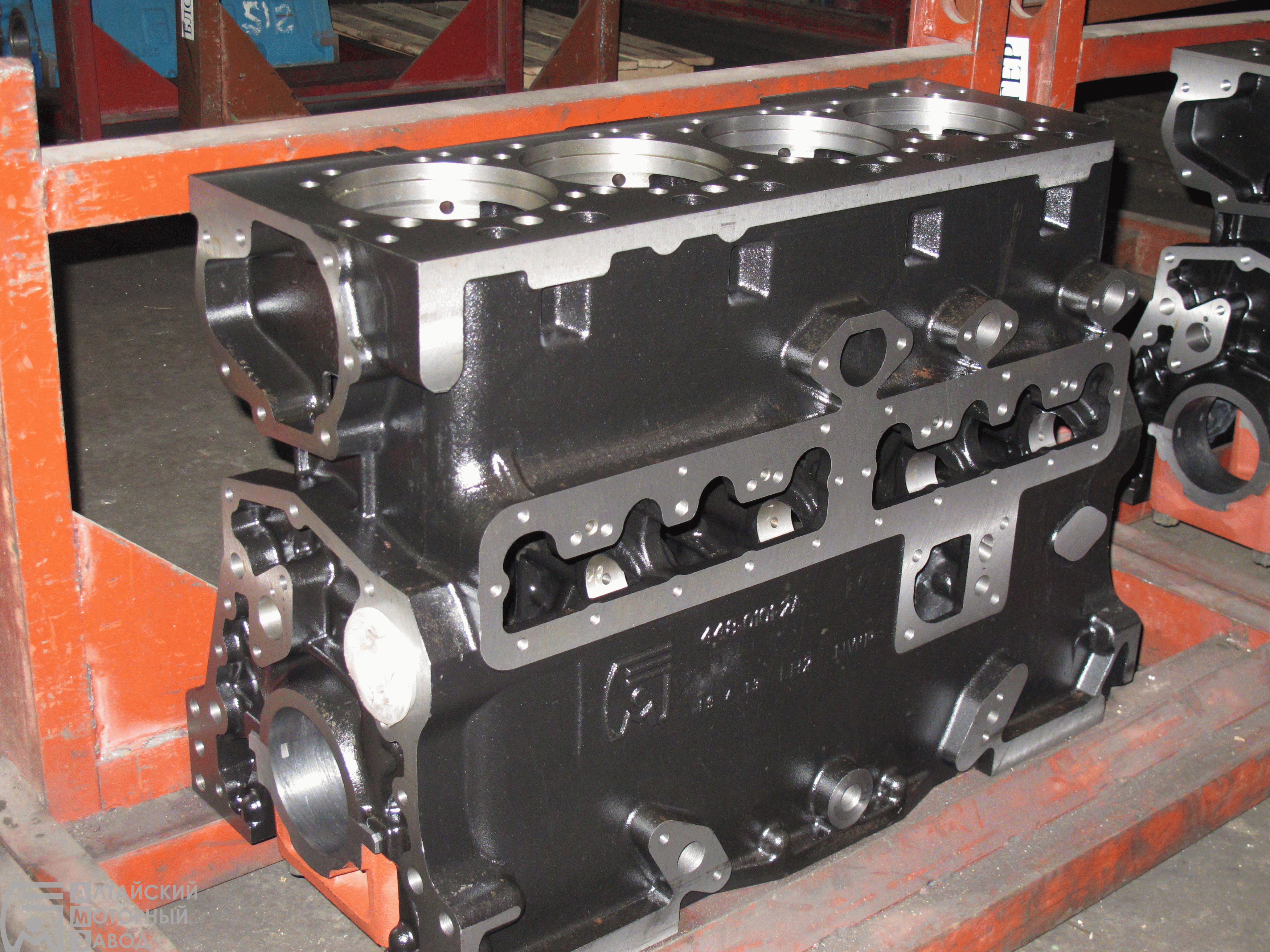 Блок картера для двигателя ОАО "АМЗ"